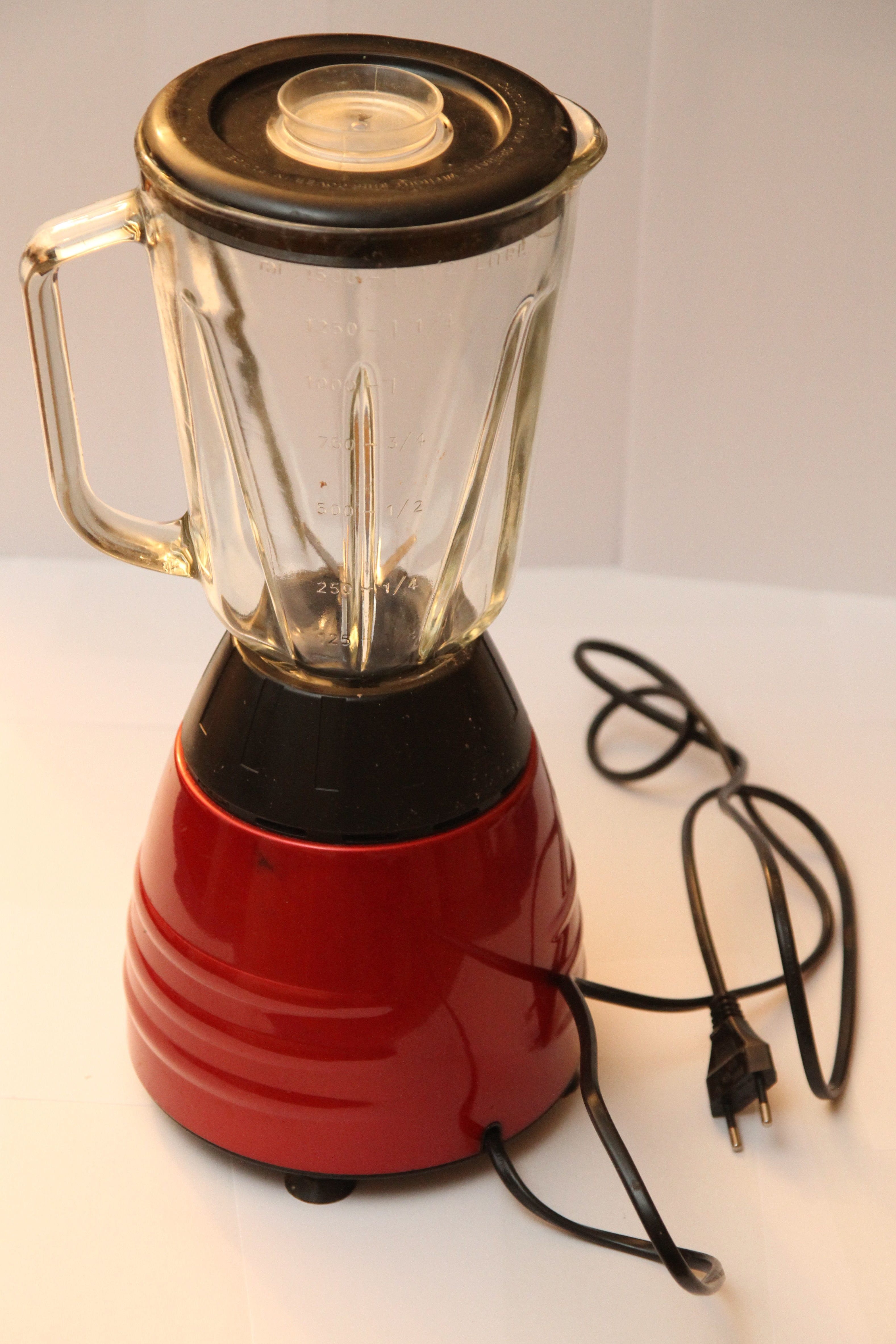 Hurtigmikser.